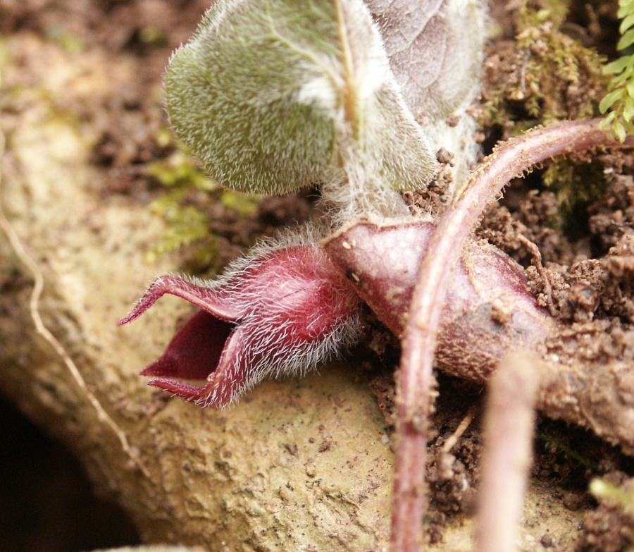 Asarum europaeum, Schwbisch-Fränkischer Wald, Germany